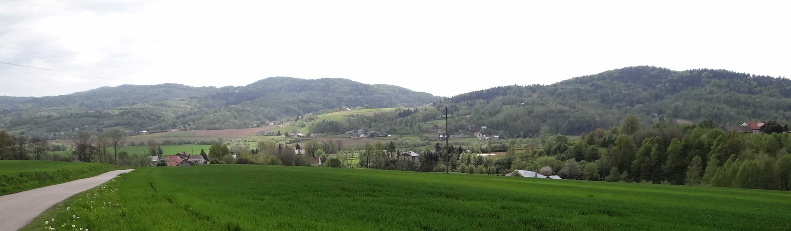 Dolina Białej i Pasmo Brzanki, widok z wzgórz miejscowości Chojnik